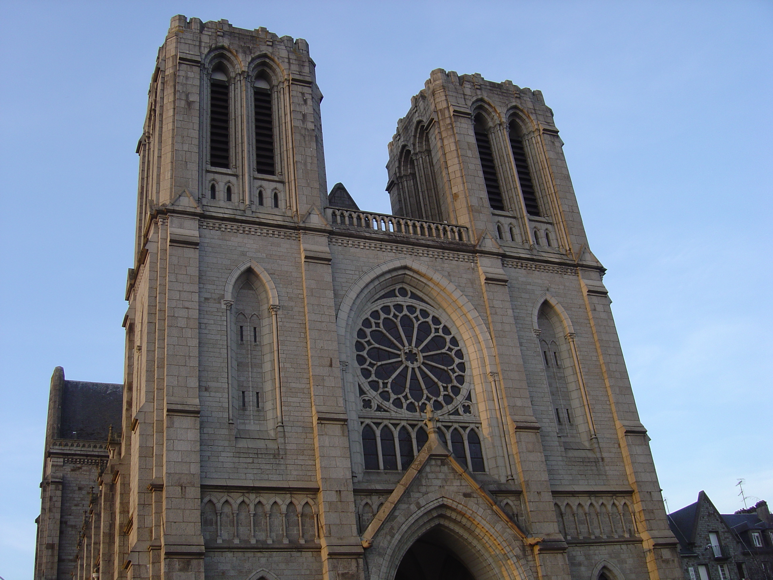 Photo de l'église Saint Germain de Flers de l'Orne prise le 04/02/07.